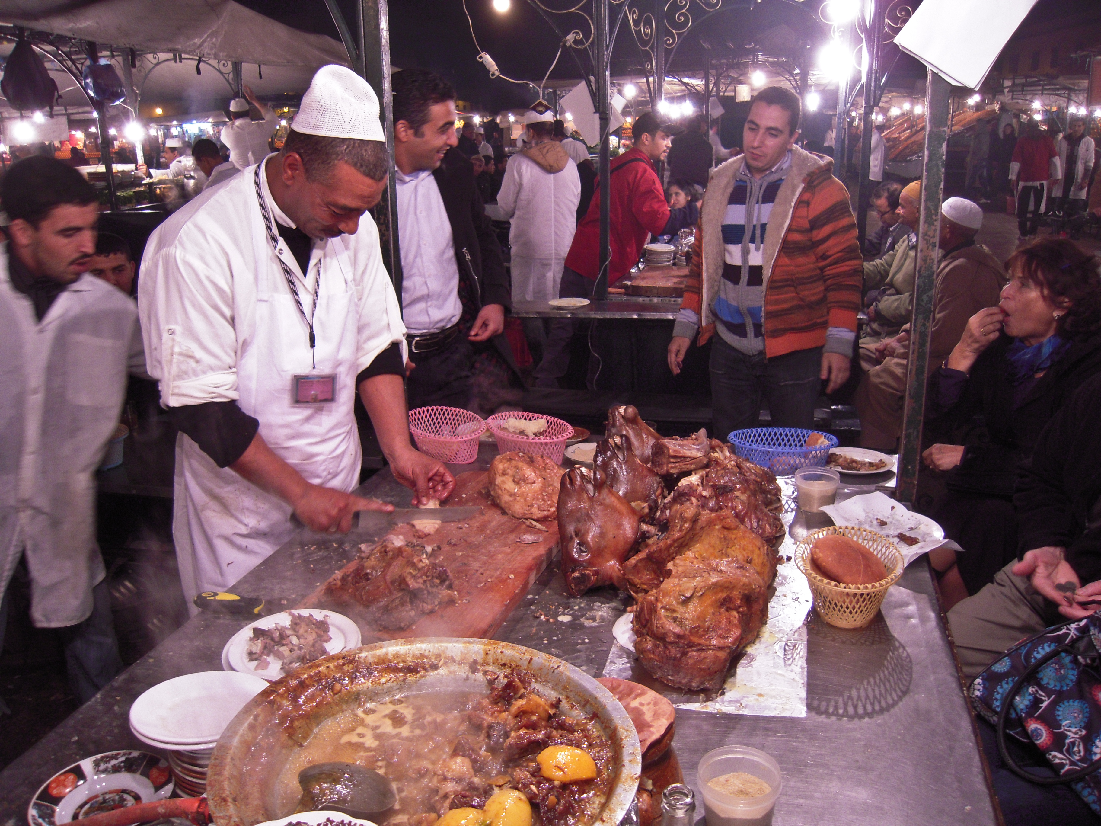 Some best food I've ever had!